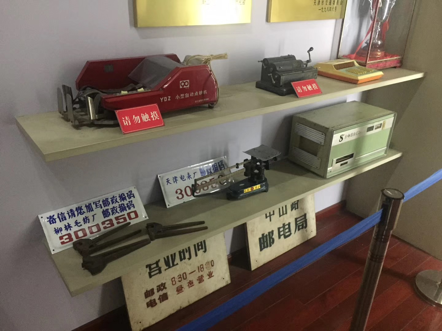 中文（中国大陆）: 天津邮政博物馆一角